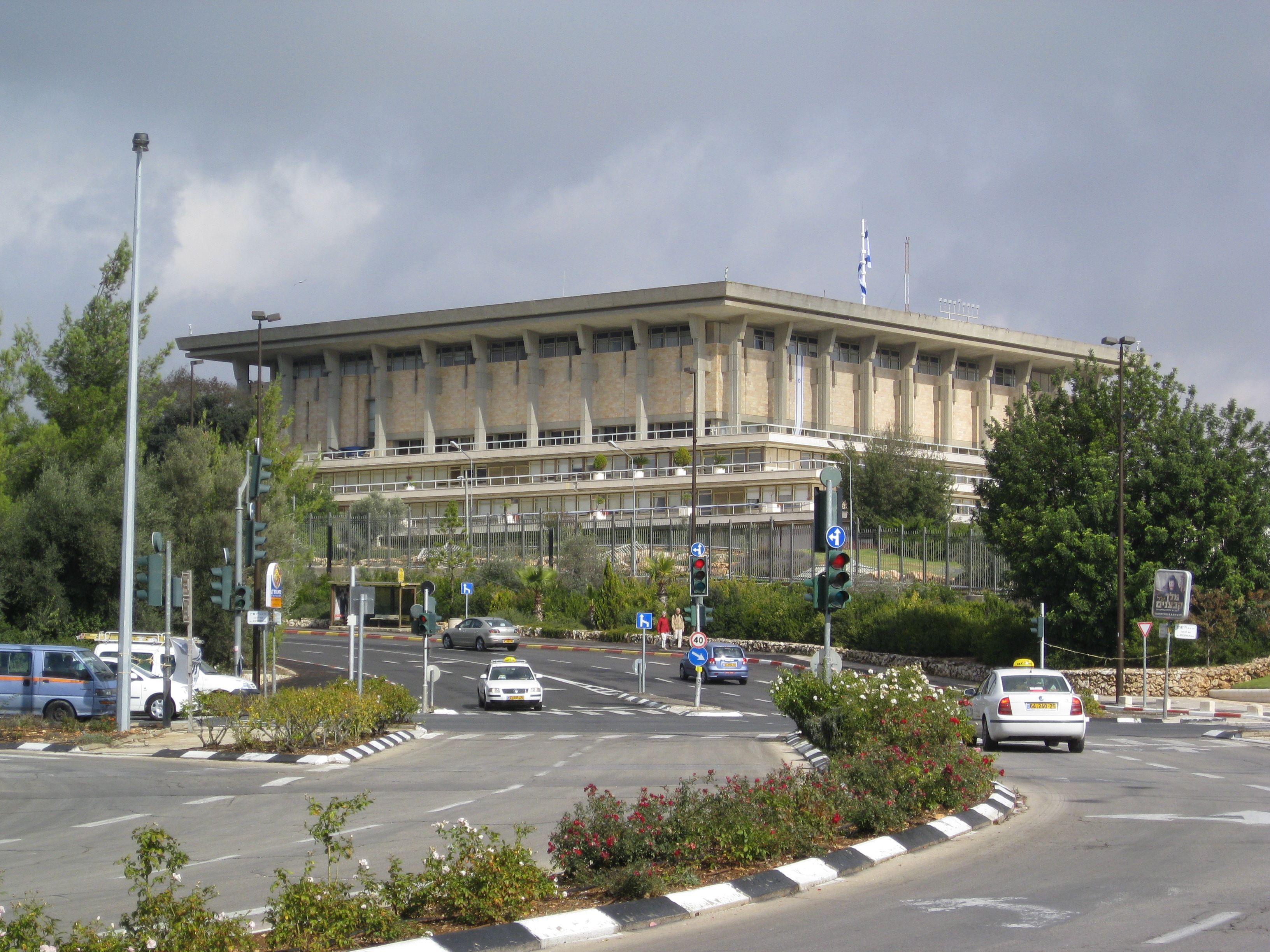 Jerusalem, Israel Jerusalem